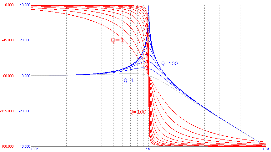 frequentiekaraktersitiek aangestuurde LCR kring